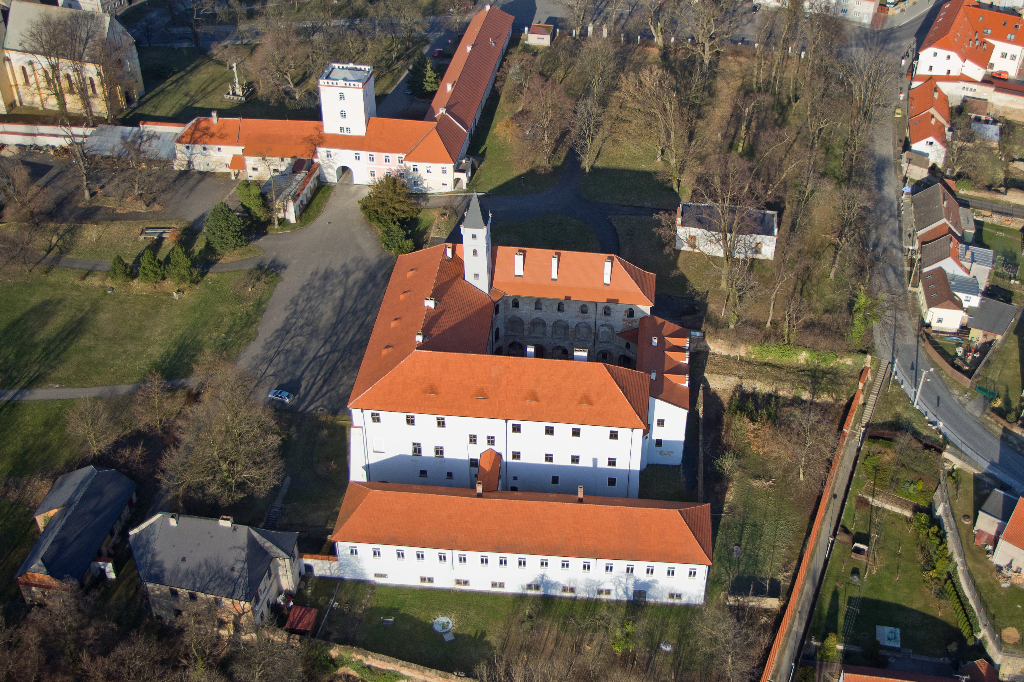 Zámek Zásmuky, Vyšehrad 2, Zásmuky